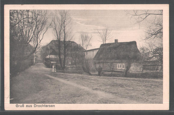 Drochtersen 1907